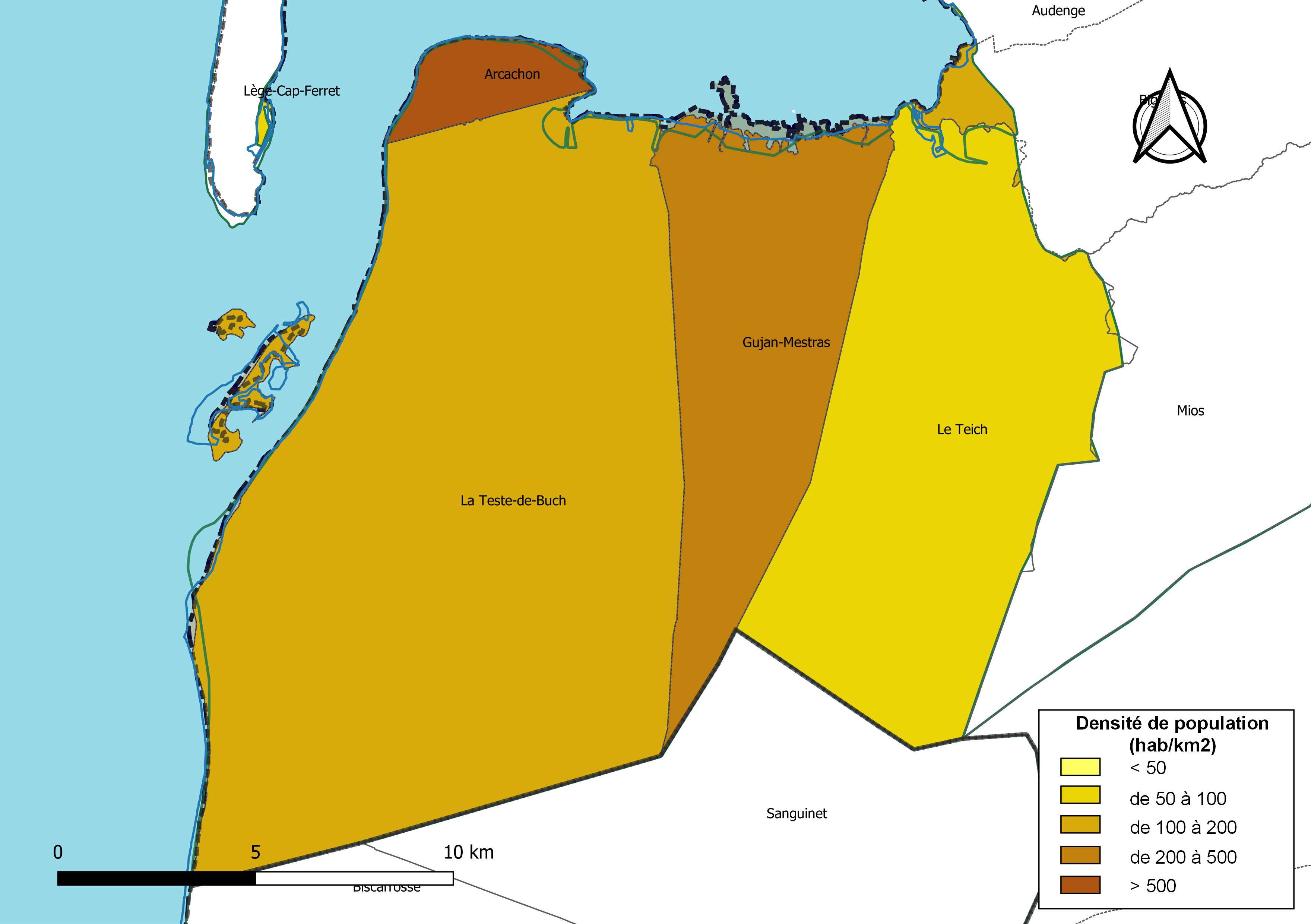 Carte des densités de population (millésimée 2016) des communes de la communauté de communes la Communauté d'agglomération Bassin d'Arcachon Sud-Pôle Atlantique, département de la Gironde, France. Composition au 1er janvier 2019.